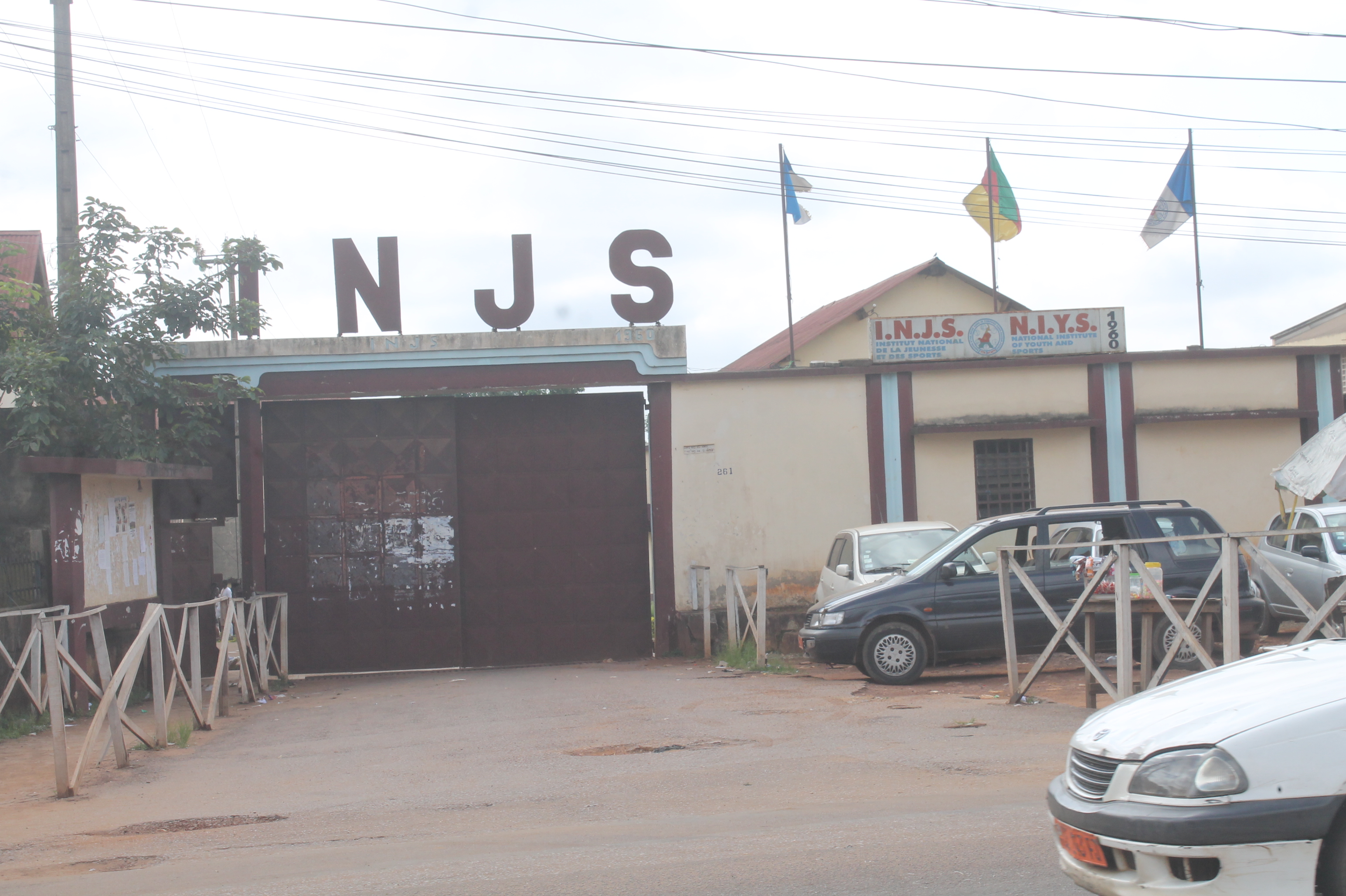 Entrée de L'Institut National de la Jeunesse et des Sports située au Plateau Atemengue (Ngoa Ekelle)